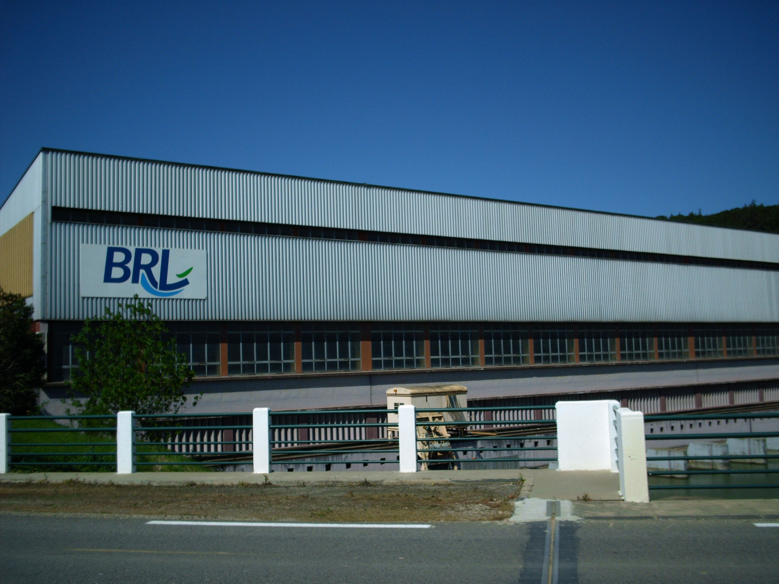 Station de pompage de Bellegarde (Gard)